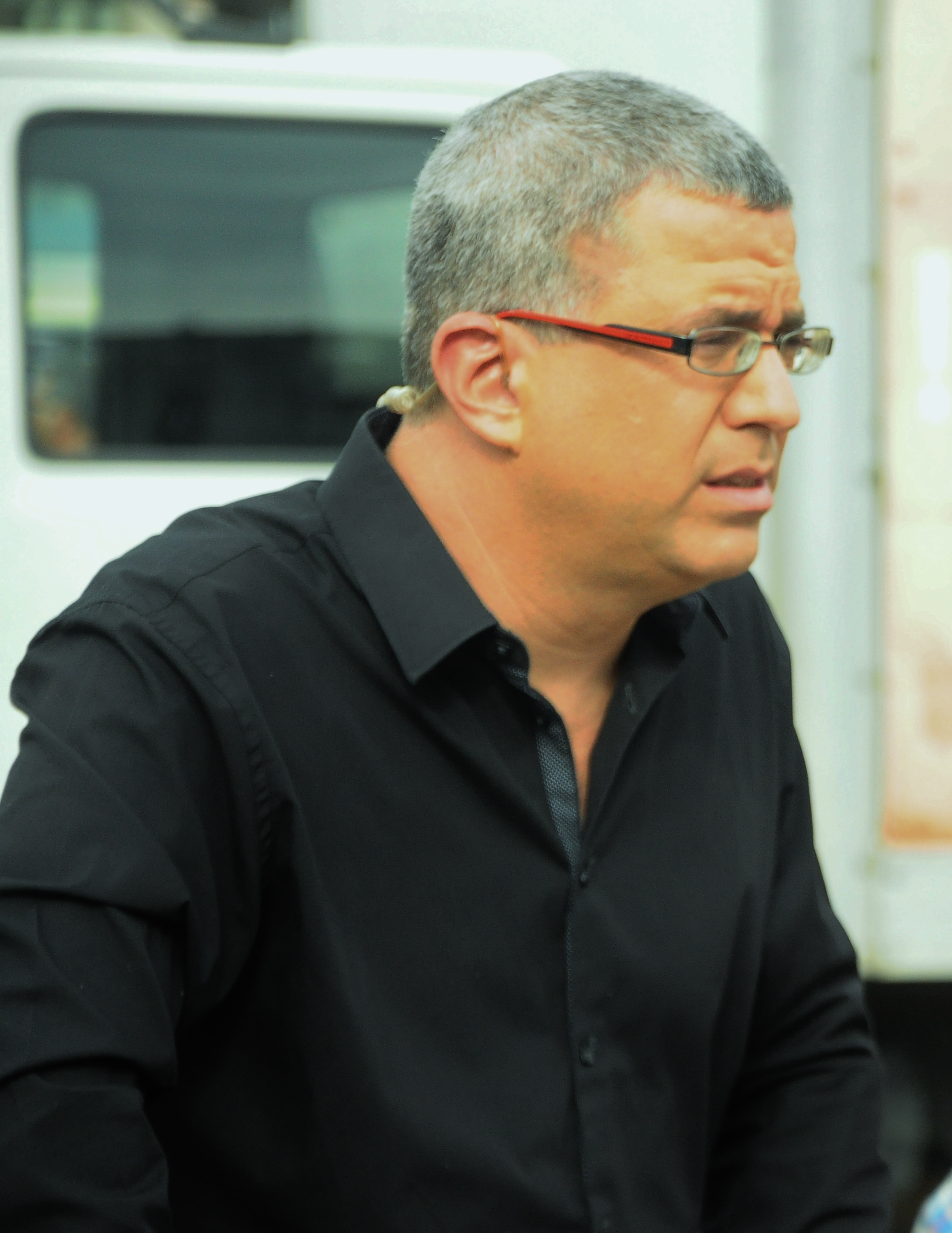 דב גיל-הר בשנת 2013